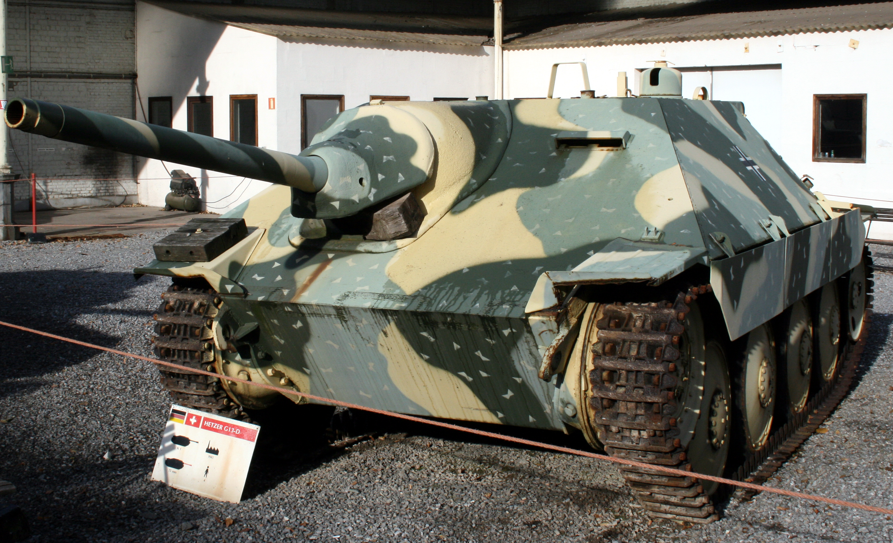 Hetzer G13-D Jagdpanzer